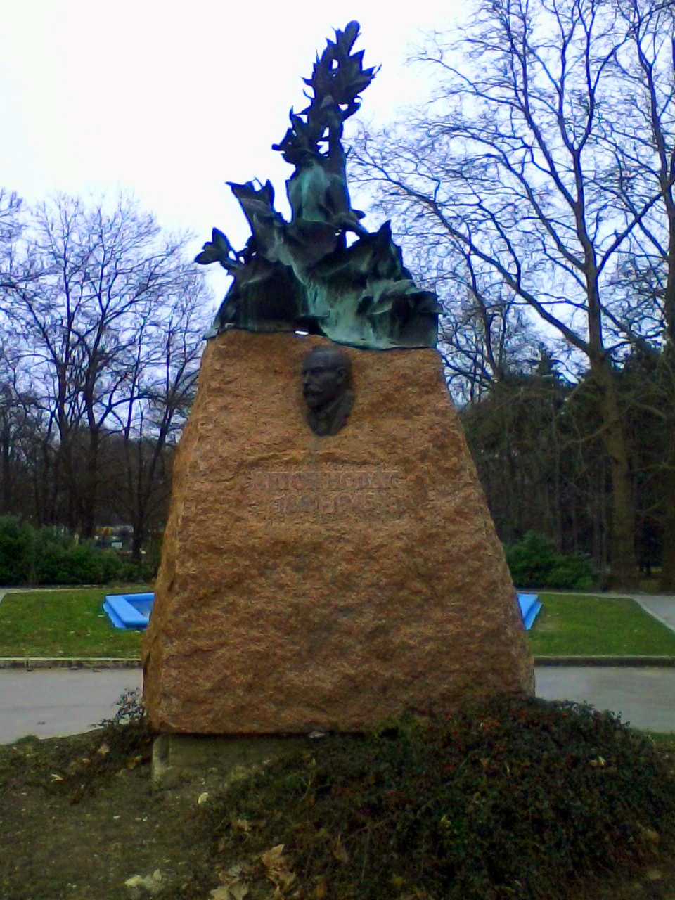 Паметник на Антон Новак в Приморски парк